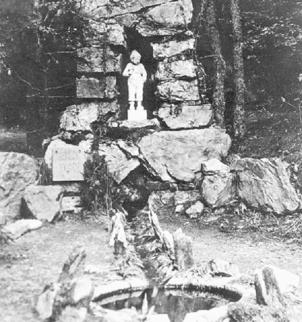 ehemaliges Spabrunnemännchen des Raerener Bildhauers Hubert Schiffer, angefertigt und aufgestellt 1910 an einer der Quellen im Langesthal bei Eupen. abmontiert im Rahmen der Errichtung der Wesertalsperre ab 1935, zwischengelagert und seit 2019 im Stadtmuseum Eupen